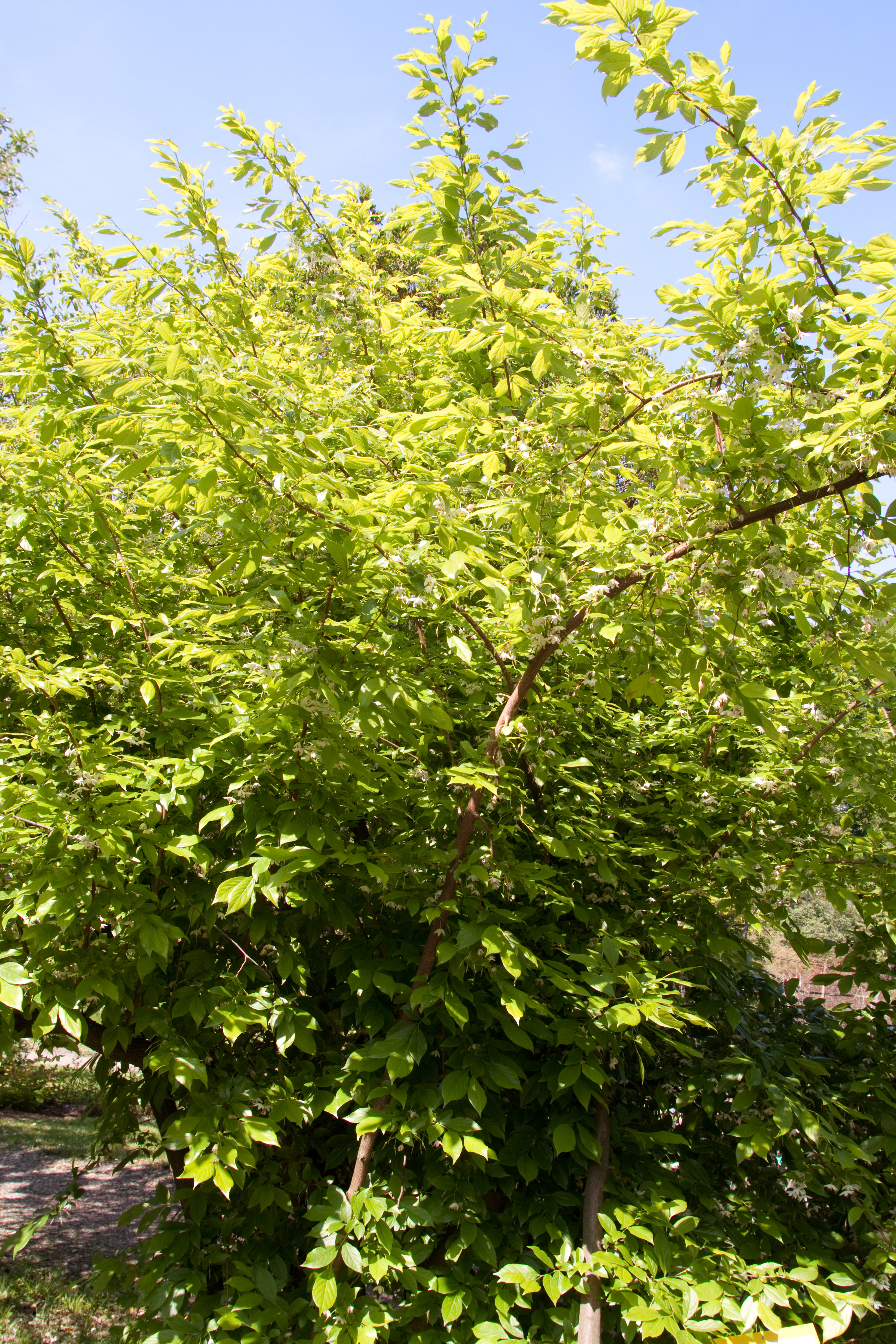 Port de Sinojackia xylocarpa - Jardin botanique de Strasbourg - FRANCE